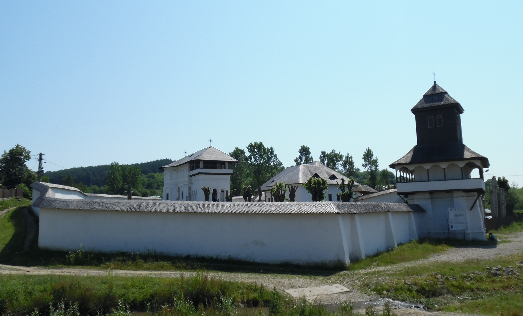 Manastirea Varbila